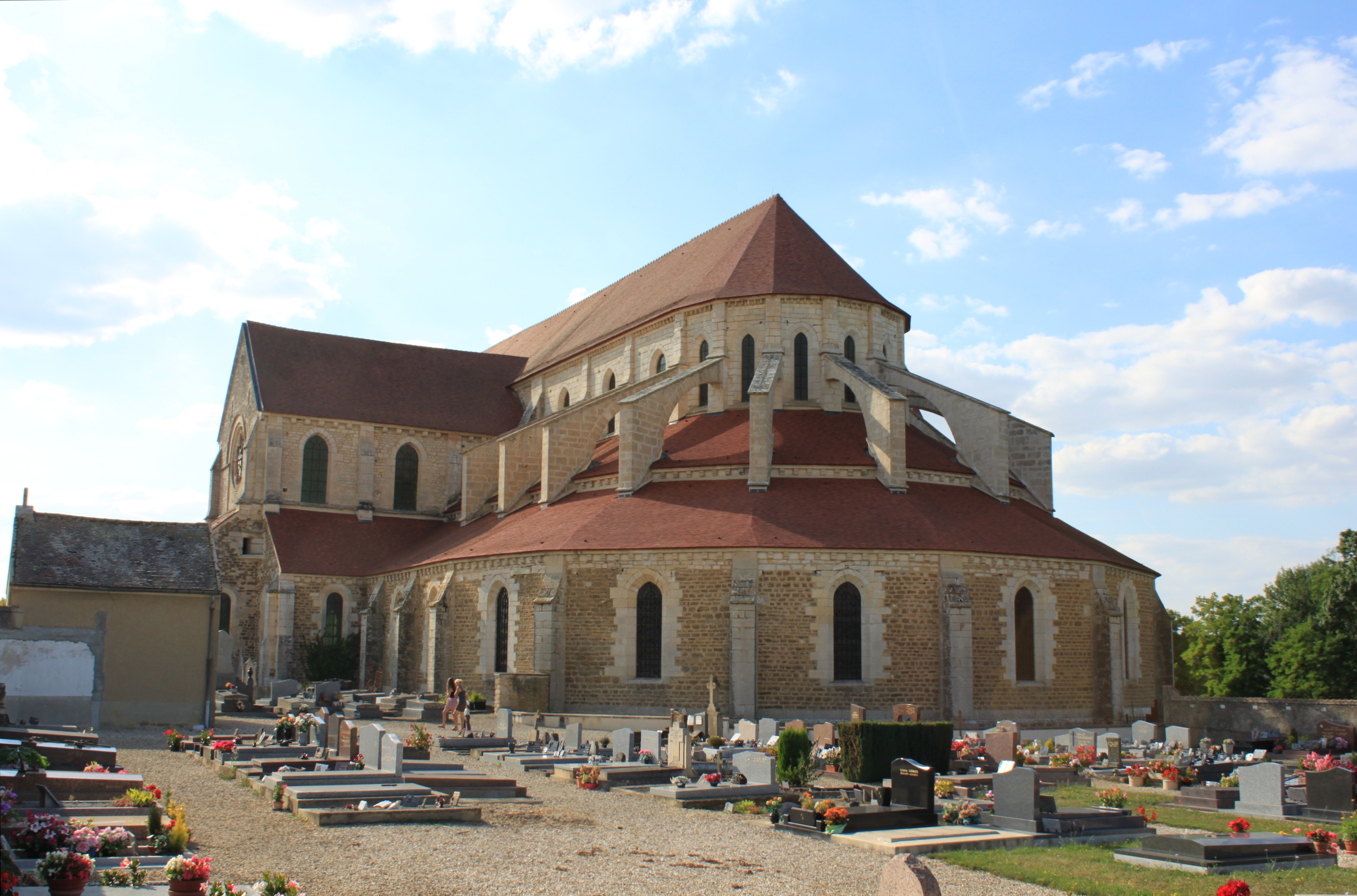 Abbaye de Pontigny, Yonne, Bourgogne, France